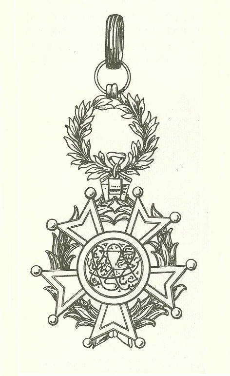 El kaukeb el Douri